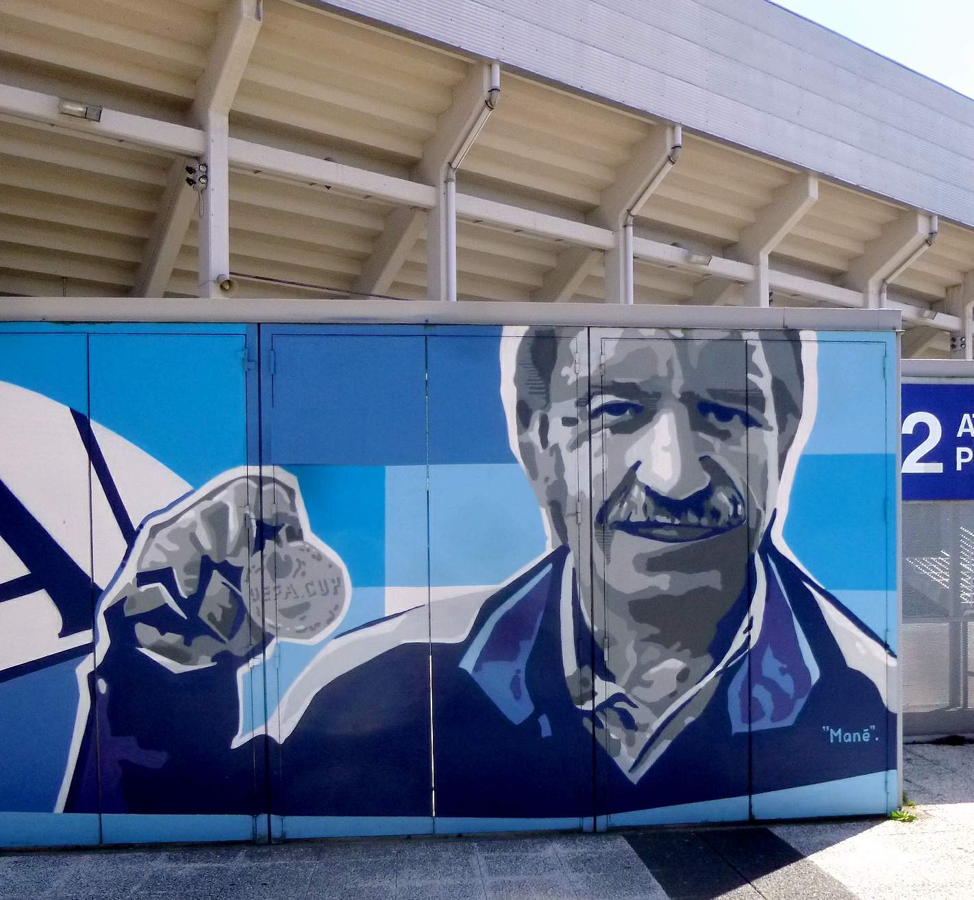 Estadio de Mendizorroza, campo del Deportivo Alavés (Vitoria)